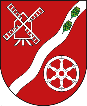 Wappen der Gemeinde Klettbach